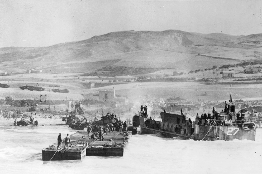 Landstigningen på Sicilien, 1944. Bildservice.